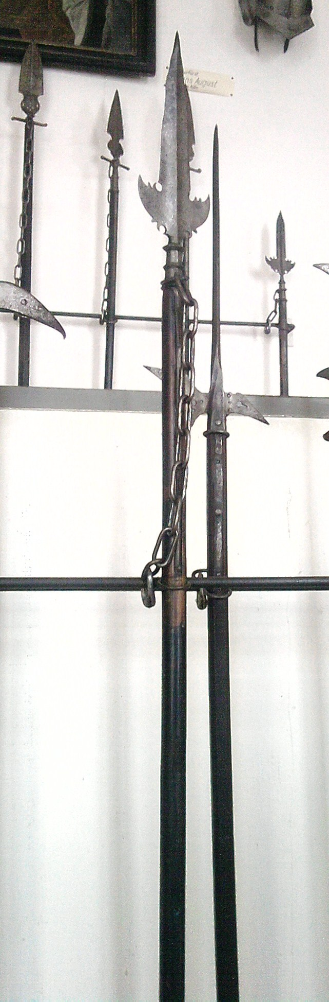 Einige Spontons in der Burg Meersburg